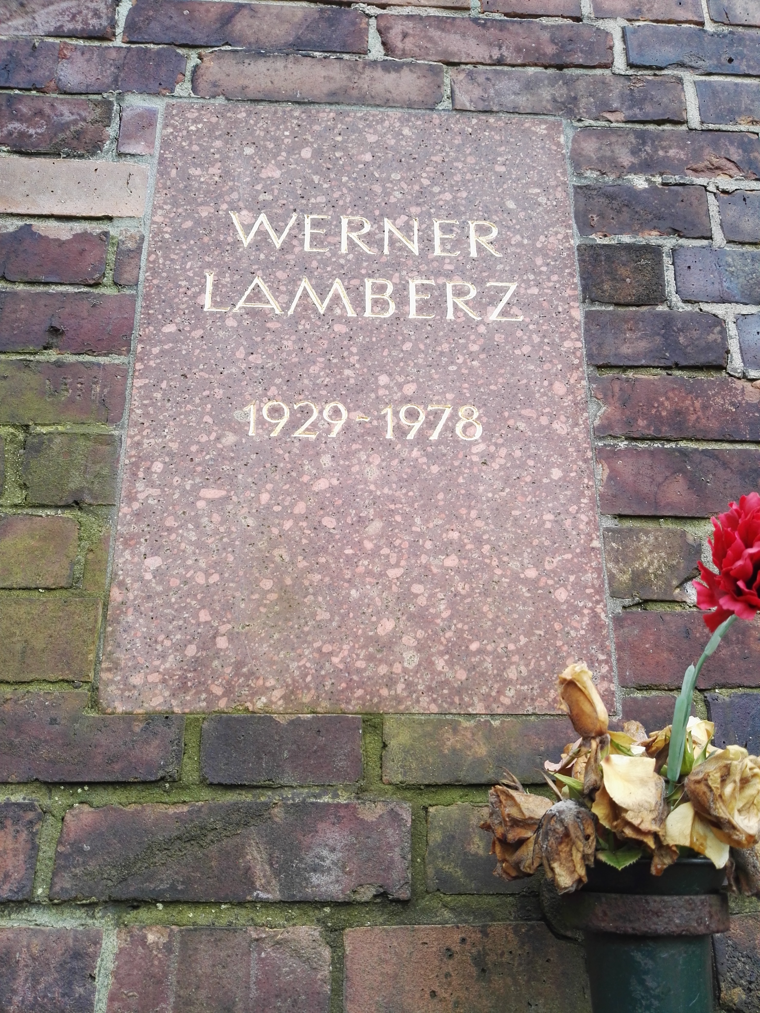 Grab von Werner Lamberz in der Gedenkstätte der Sozialisten auf dem Zentralfriedhof Friedrichsfelde in Berlin-Lichtenberg